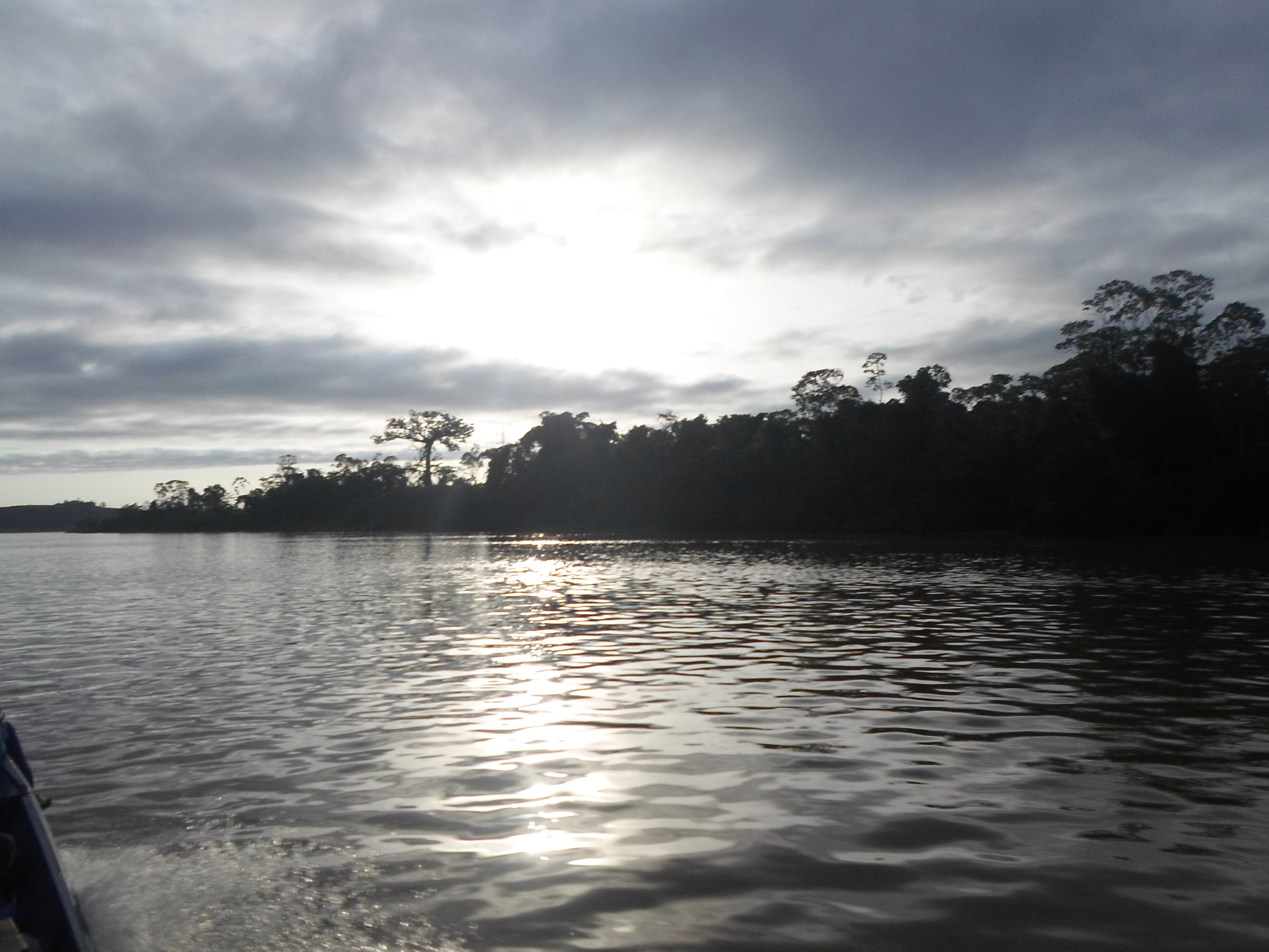 amanece sobre la isla ratón Amazonas